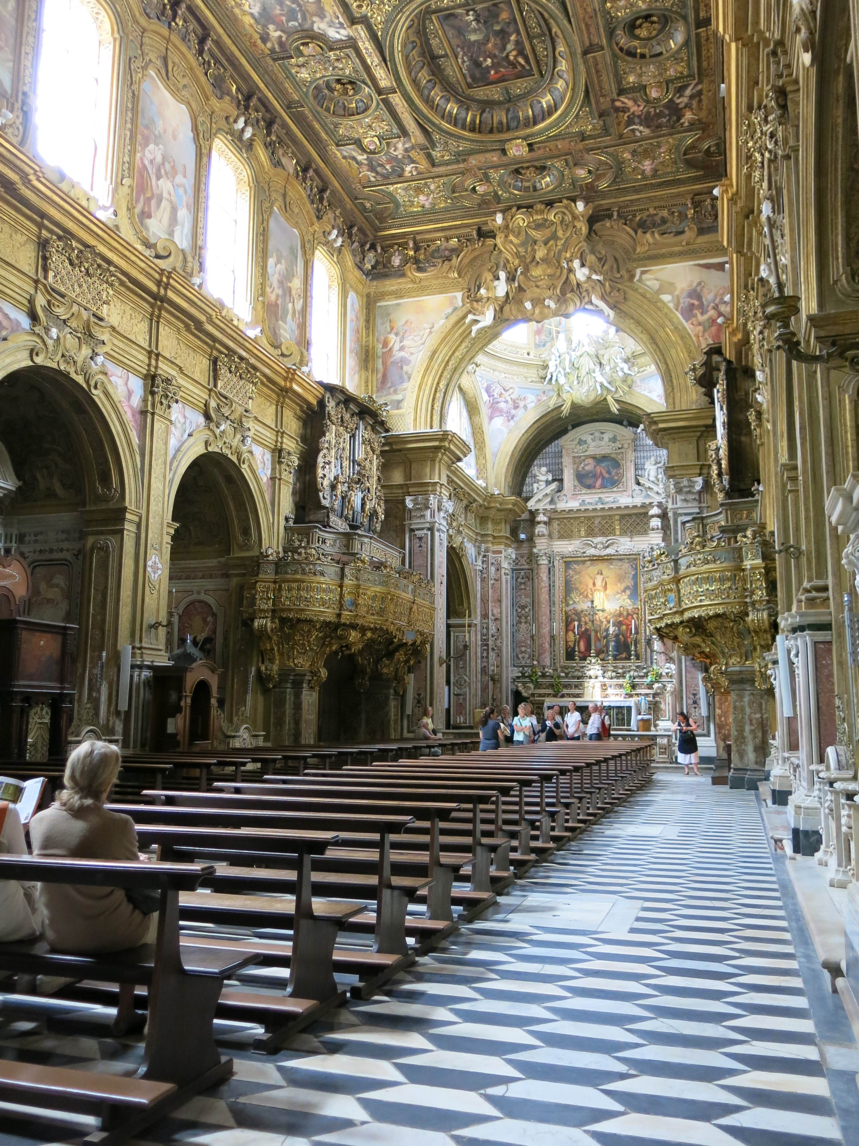 Le chiese di Napoli